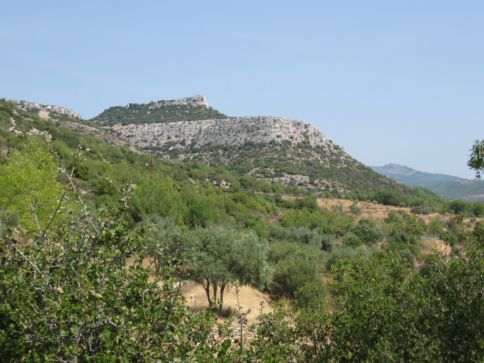 Kastri-Akropolis aus Ost-Südost